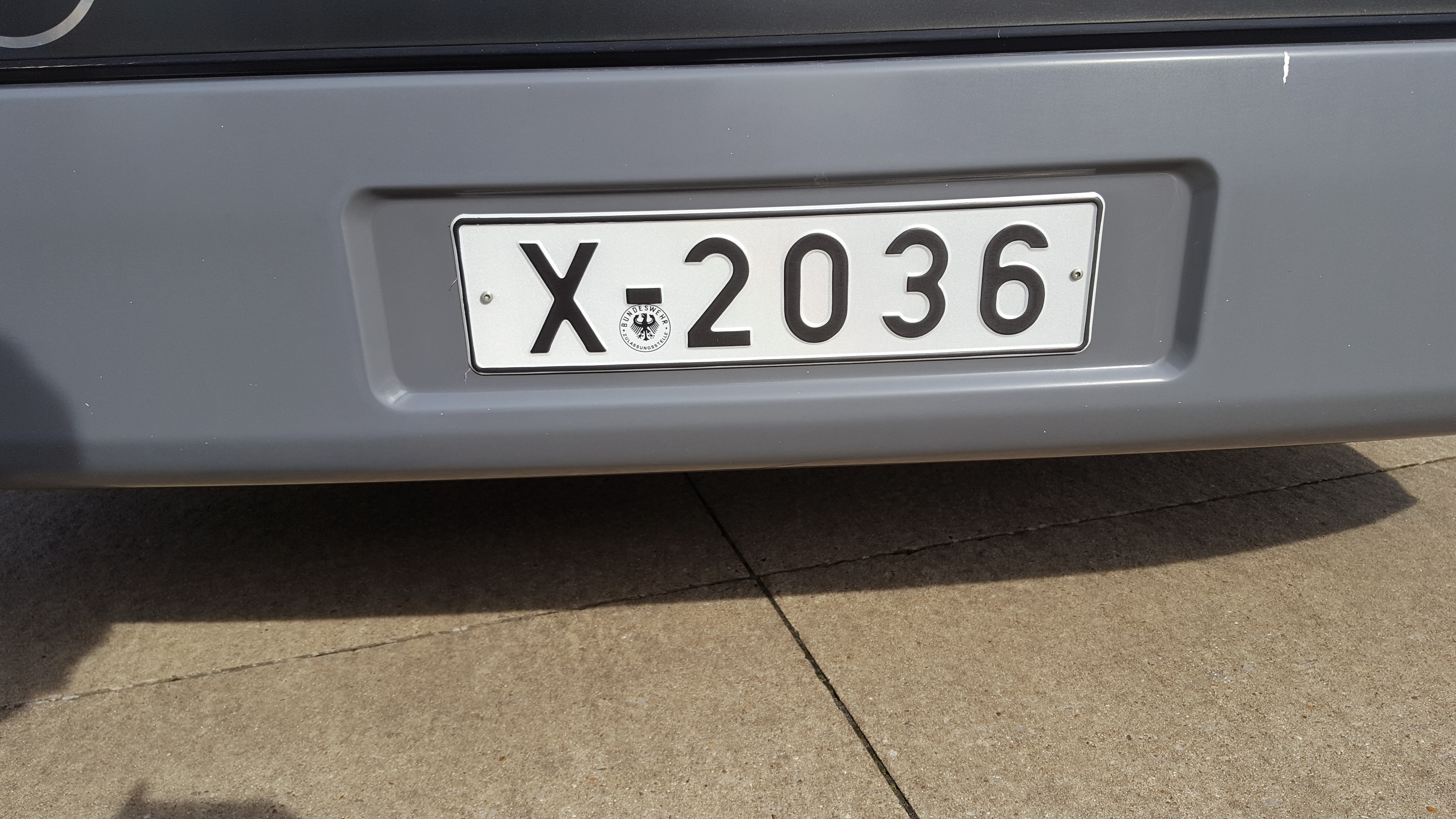 X-Kennzeichen auf der Luftwaffenbasis in Geilenkirchen